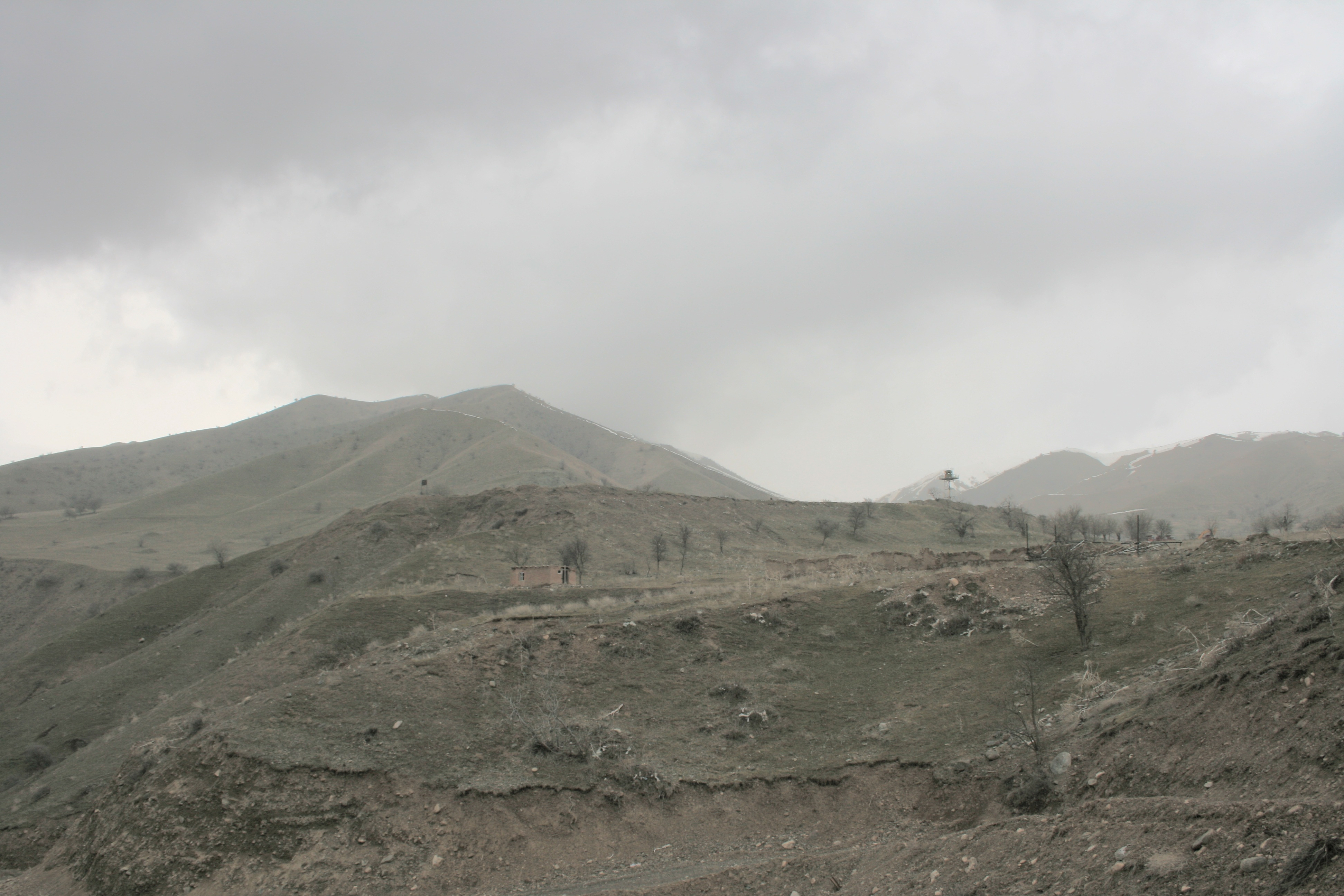 12 Застава, 2012 год. Видна уцелевшая вышка.